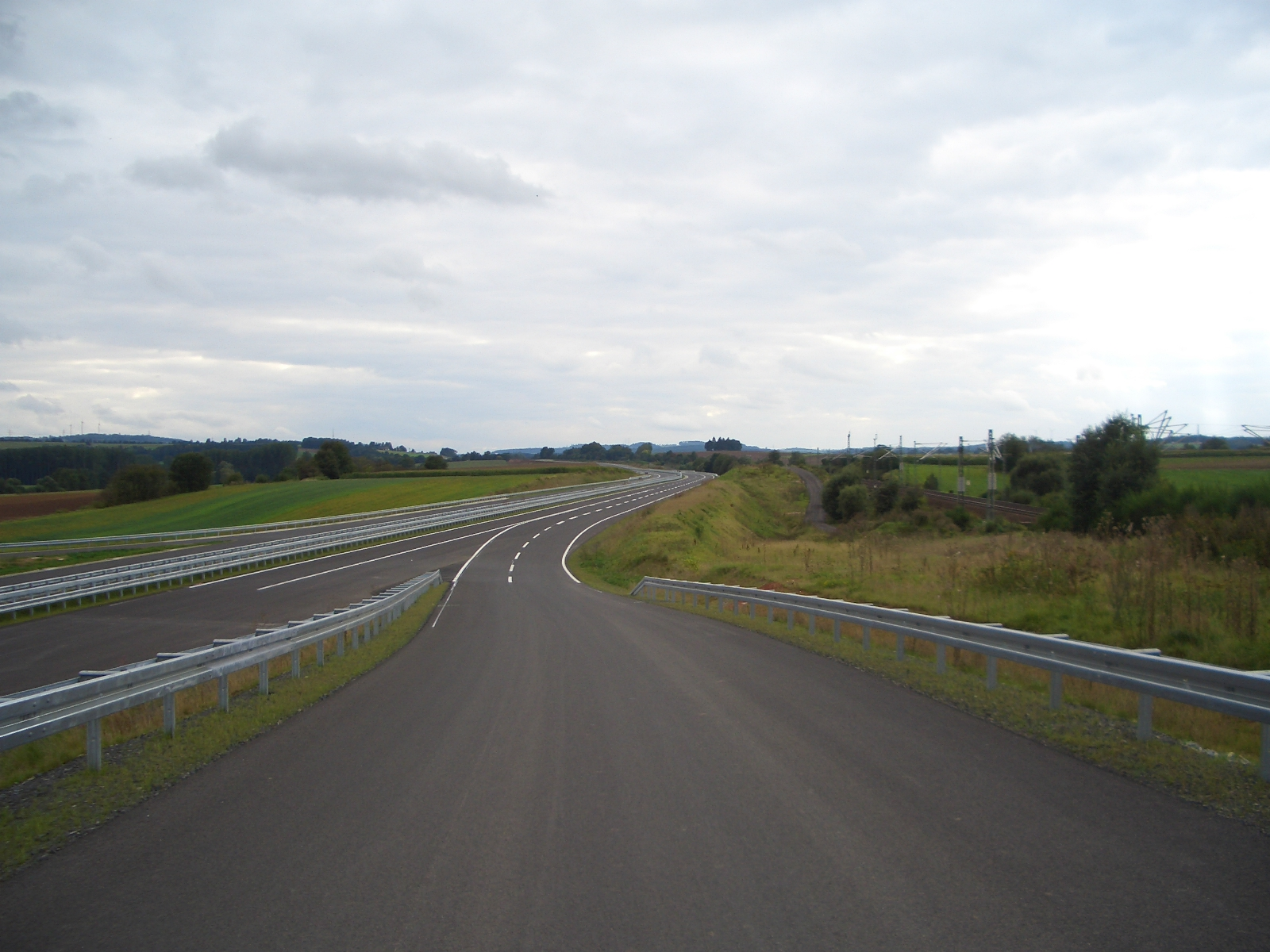 Anschlusstelle Neuhof-Süd, Blick in Richtung Flieden